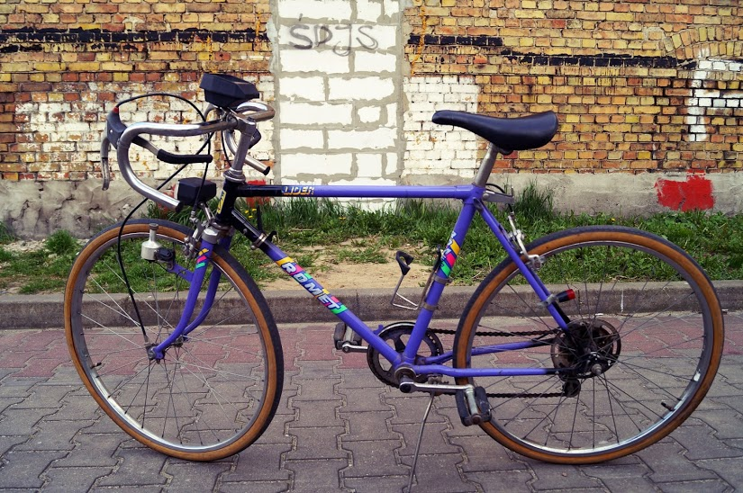 romet lider sport bike polish construction